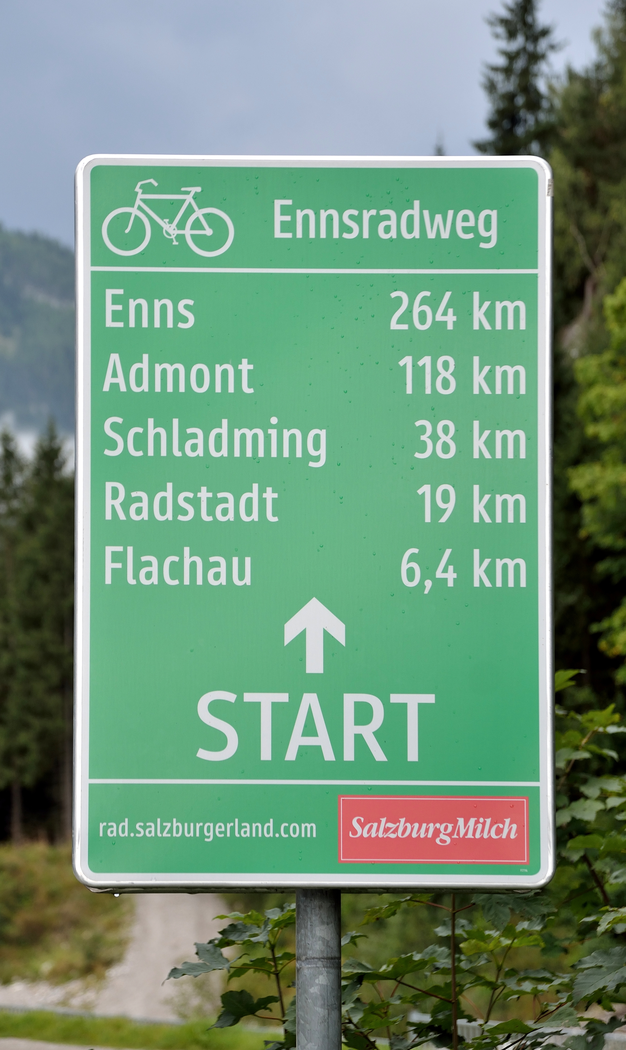 Am Beginn des Ennsradwegs in Flachau in Salzburg, dort wo die (kleinere) Enns von links in die Pleißling mündet und ab da Enns heißt.